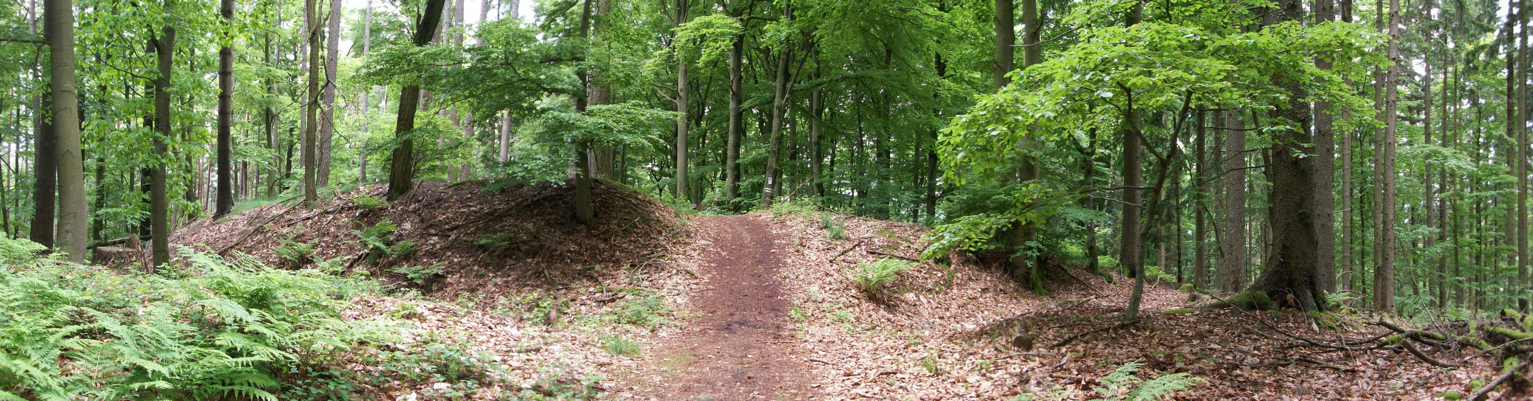 Alte Burg oder auch Altenburg auf dem Reuschberg bei Schöllkrippen, Panorama von Osten